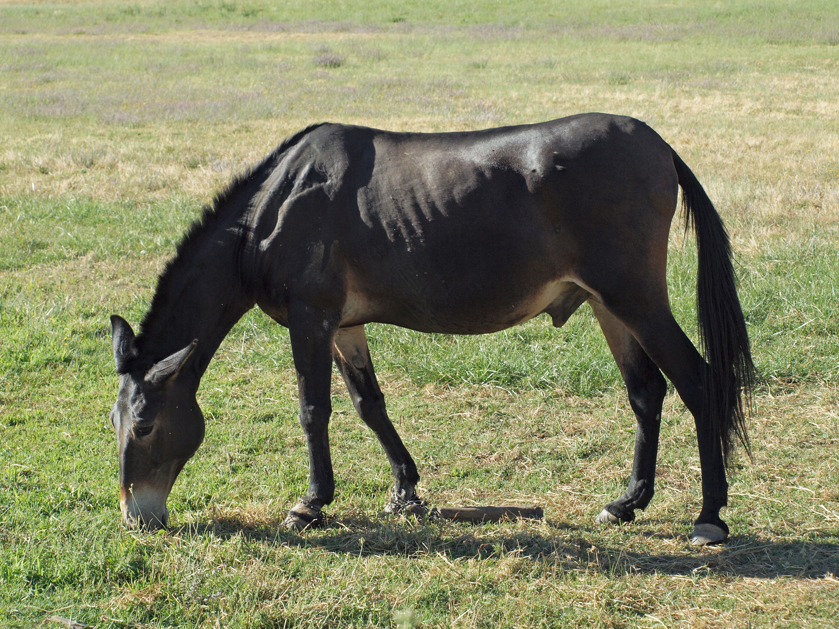 Mulo en Losar de la Vera (Cáceres, España).